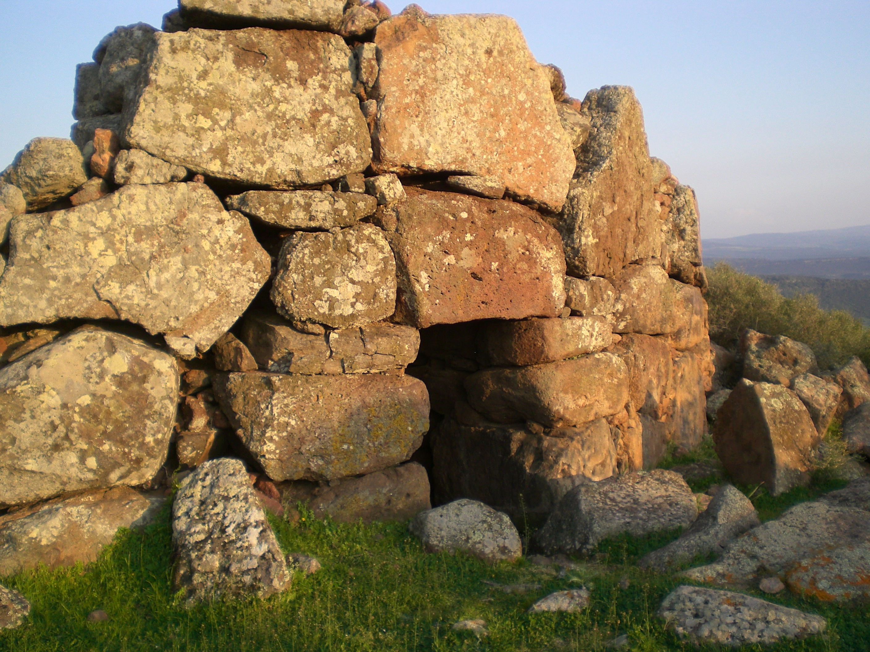 Complesso prenuragico di Monte Baranta, Olmedo, Sardegna, Italy